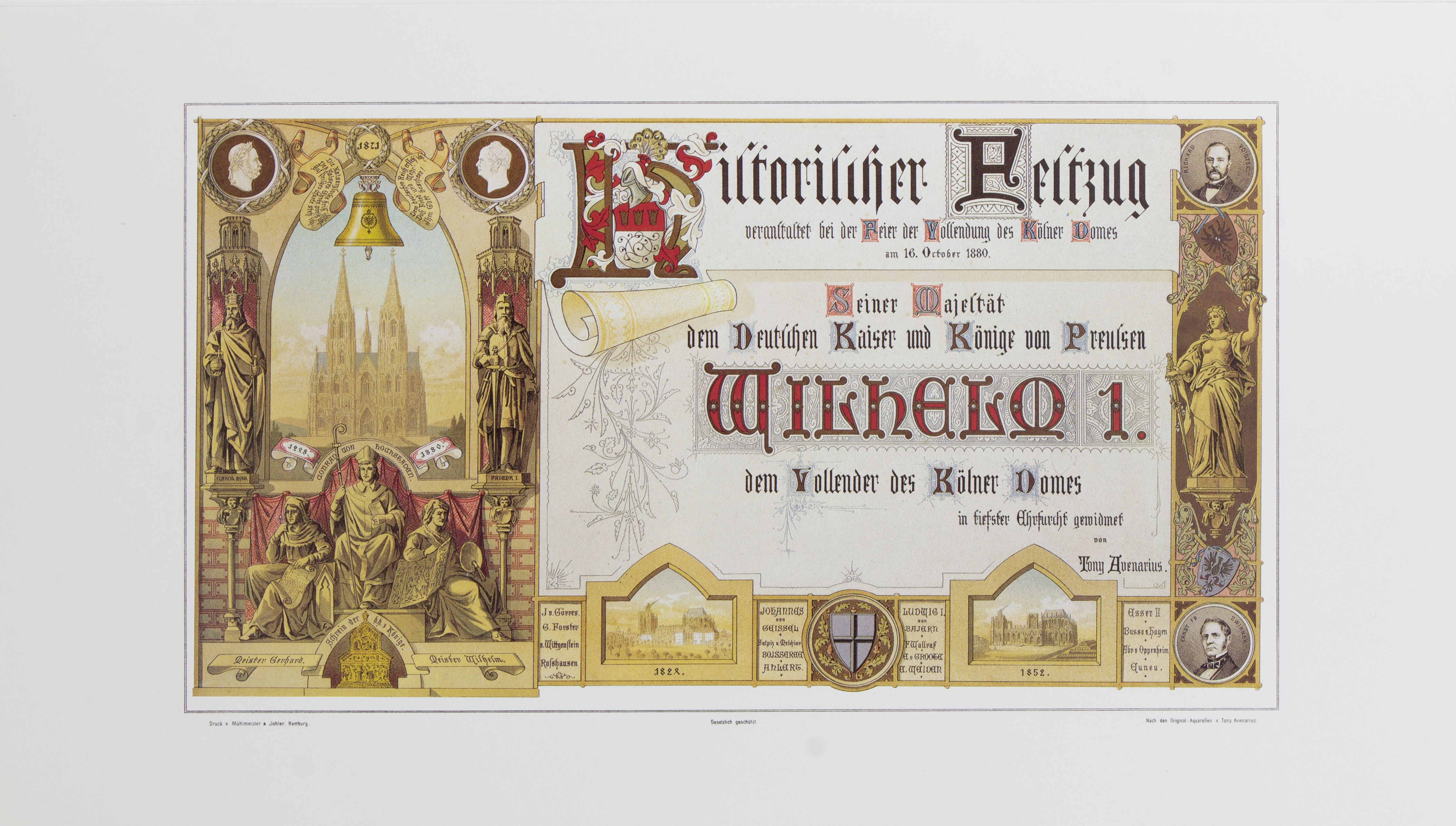 Tony Avenarius: Historischer Festzug veranstaltet bei der Feier der Vollendung des Kölner Doms am 18. October 1880. Titelblatt